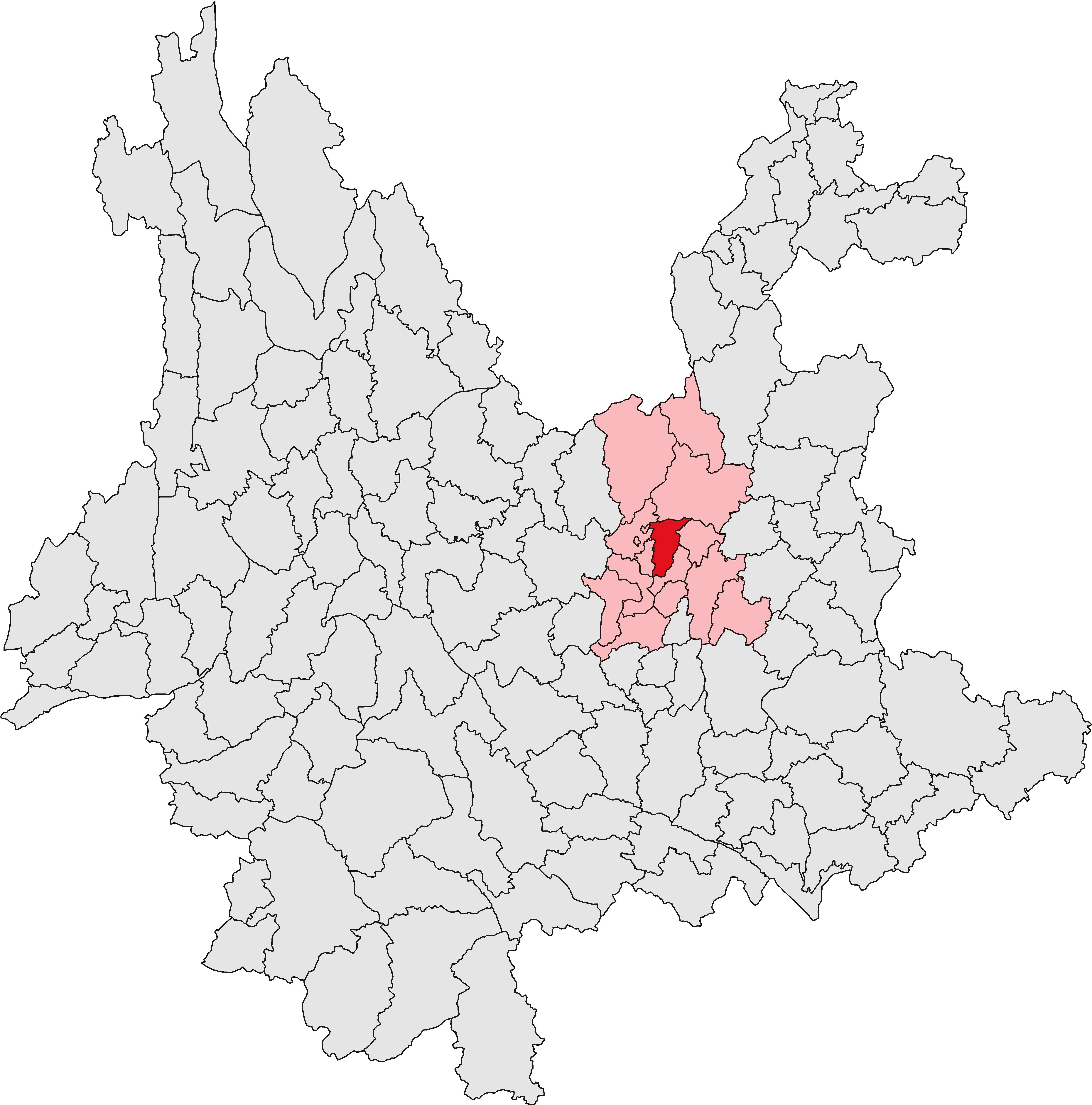 盘龙区位置图